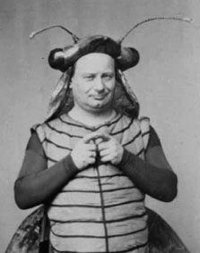 Désiré (1823-1873) dans le rôle de Jupiter d' Orphée aux Enfers, musique de Jacques Offenbach, au théâtre des Bouffes- Parisiens